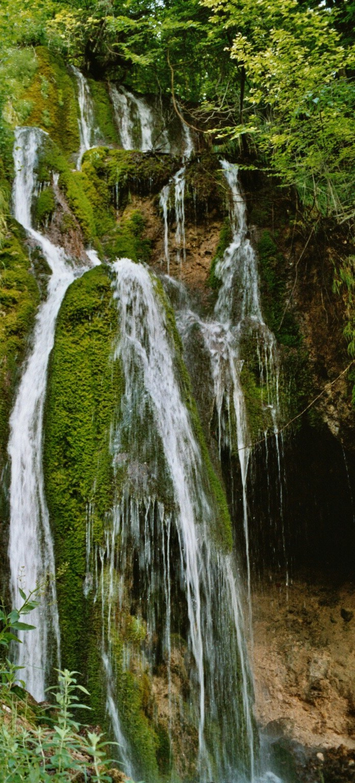 wasserfall